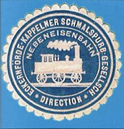 Siegelmarke der von 1898 bis 1903 bestehenden Eckernförder-Kappelner Schmalspurbahn-Gesellschaft